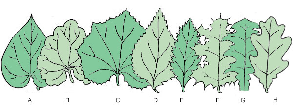 Brzegi blaszek Rysunek rozszerza grafikę PD (Dixi). Autor tej grafiki: Nova 22:52, 17 wrz 2004 (CEST)